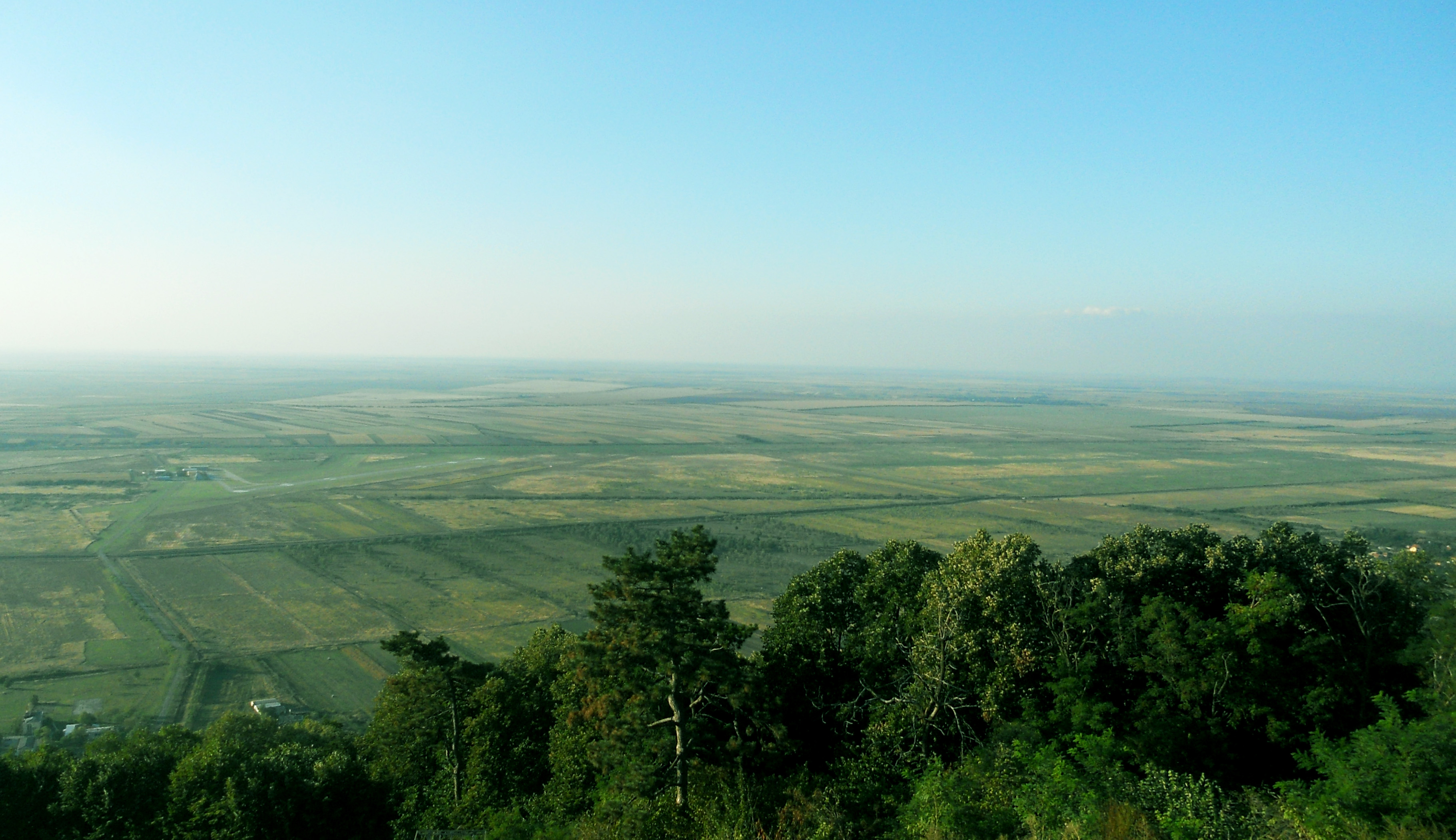 Ово је фотографија заштићеног природног добра у Србији под шифром: ПИО05 This is a a photo of a natural area in Serbia with ID: ПИО05 Vršačke planine se uzdižu usred Panonske ravnice u jugoistočnom delu Banata. Spadaju u ostrvske planine.